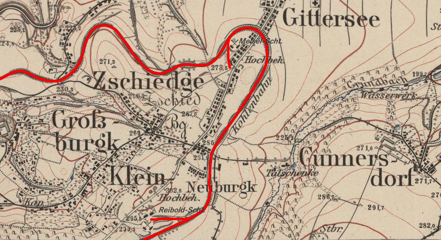 Topographische Karte (Äquidistantenkarte) Sachsen, Ausschnitt Dresden Blatt 66, ,1:25000,1904, Kohlebahn in Gittersee.